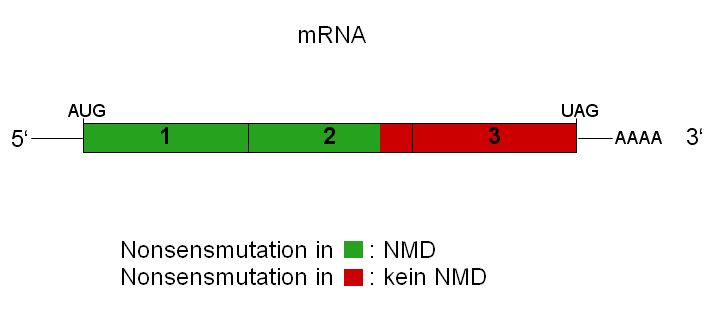 mRNA: Schema